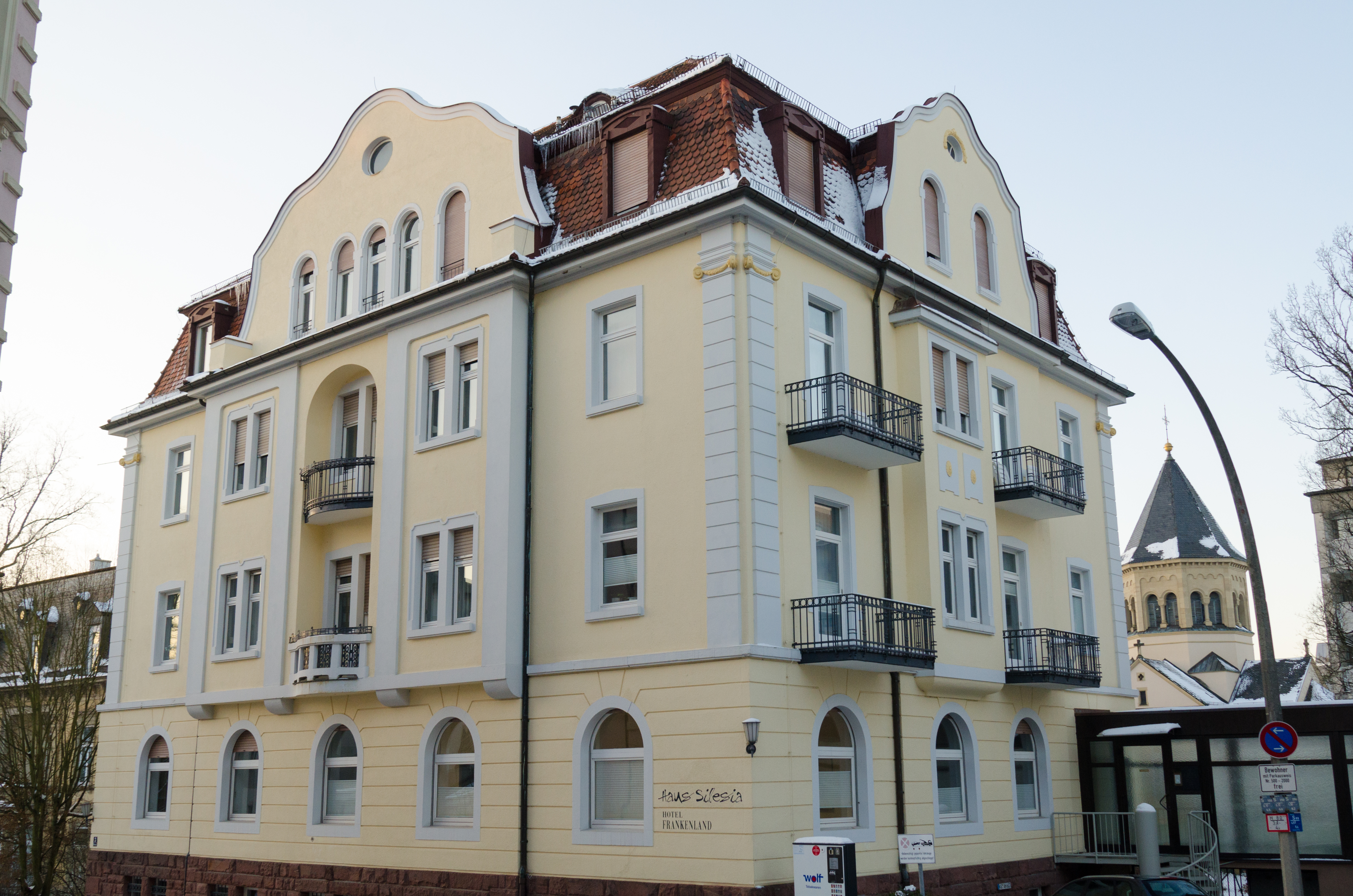 Bad Kissingen, Ballingstraße 3